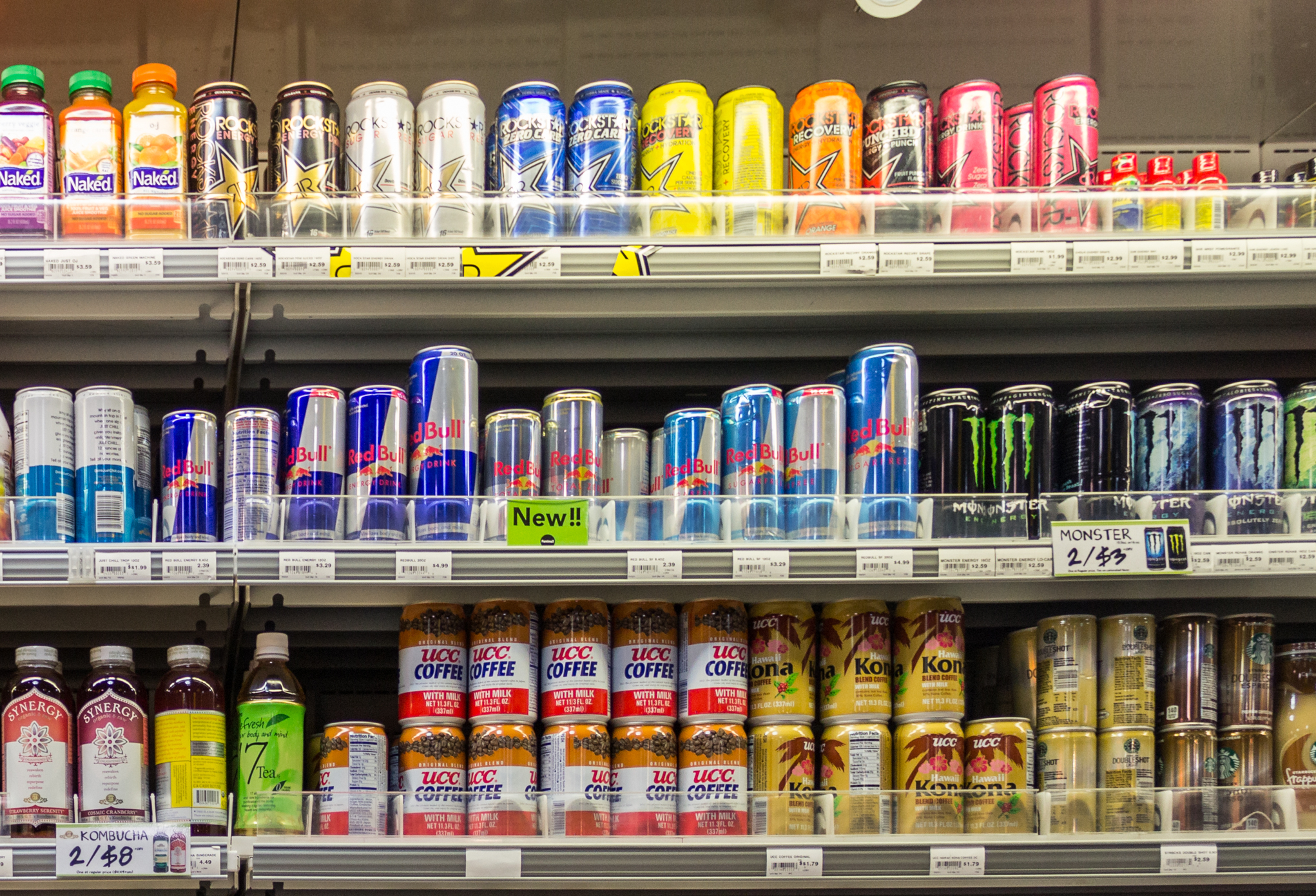 Energiedranken in een supermarkt in Los Angeles.